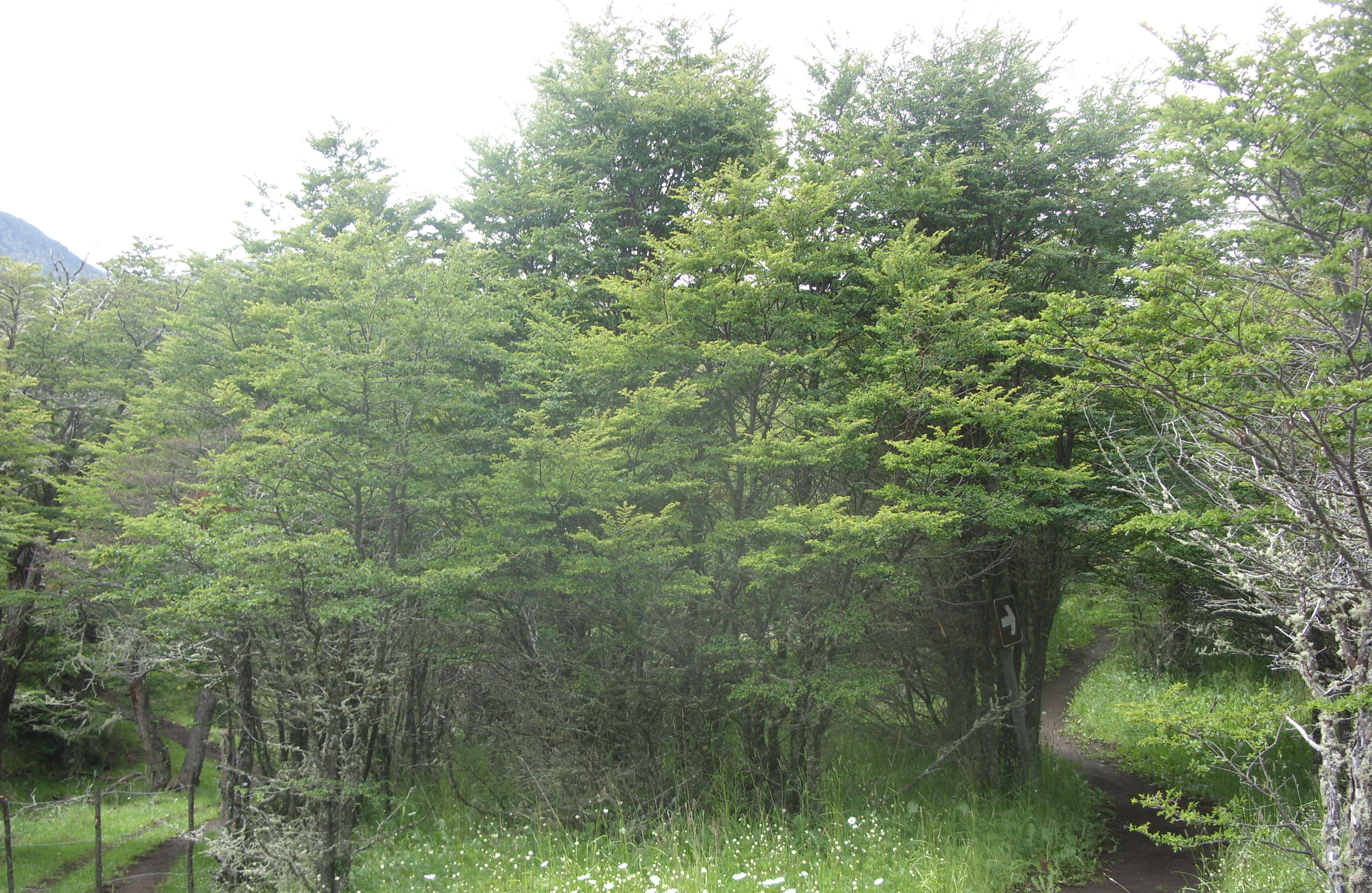 Ñires (Nothofagus antarctica) en la Reserva Nacional Coyhaique, Coyhaique, región de Aysén, Chile